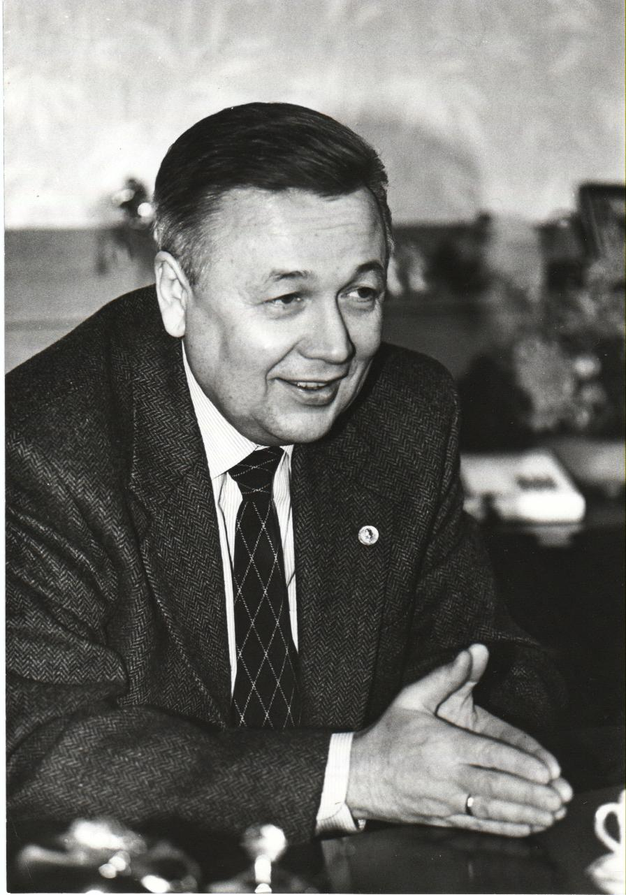 Айрат Мингазович Шаммазов (род. 31 августа 1947, Уфа) — советский и российский учёный в области механики сплошных сред, транспортировки и хранения нефти и газа; педагог, организатор высшего образования. Доктор технических наук, профессор, заслуженный деятель науки Российской Федерации. Лауреат двух премий Правительства Российской Федерации в области образования. Ректор УГНТУ с 1994. Президент АН РБ (2006—2011).